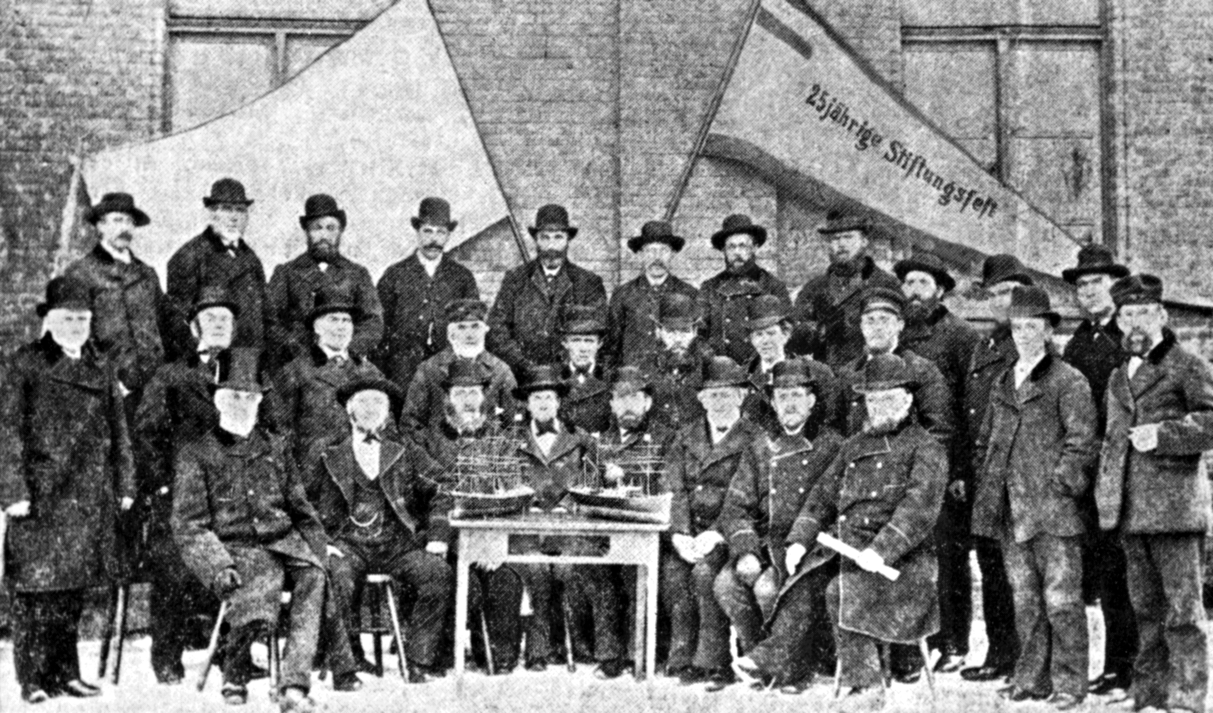 Die Uetersener Schiffergilde "Emanuel" beim 25jährigen Jubiläum am 22. Januar 1892.